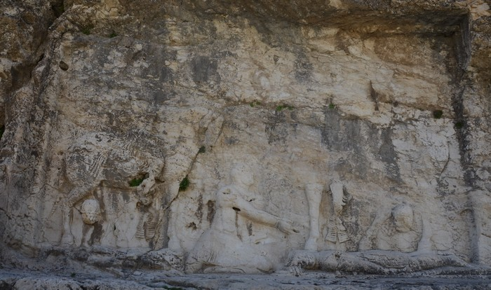 Relevo Bixapur I sobre a investidura de Sapor I